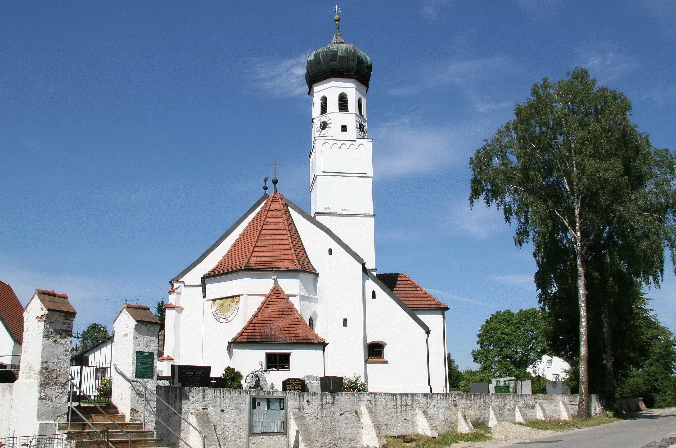 Altdorf, Pfettrach, Pfeffenhausener Straße 21. Kath. Filialkirche St. Othmar, um 1500, barockisiert; mit Ausstattung; barockes Friedhofstor; Seelenhaus, wohl 19. Jahrhundert.